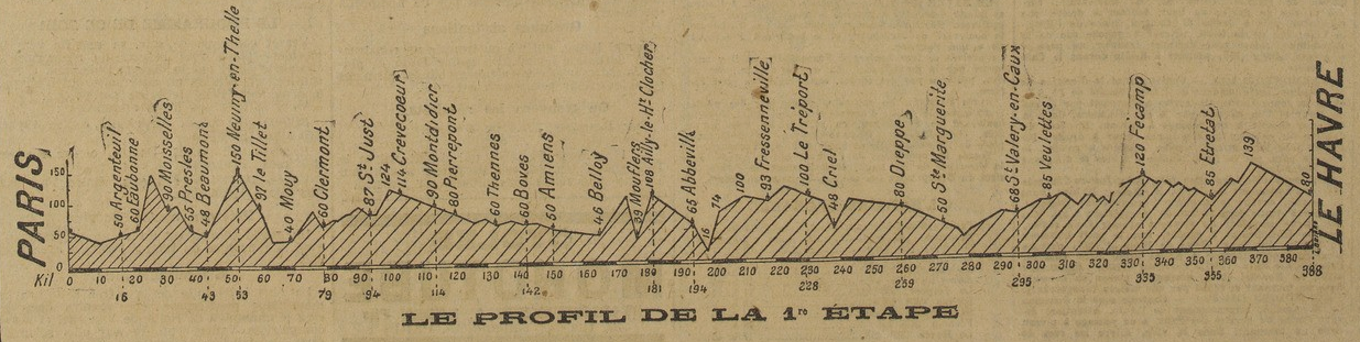 Profil de la 1e étape du Tour de France cycliste 1919